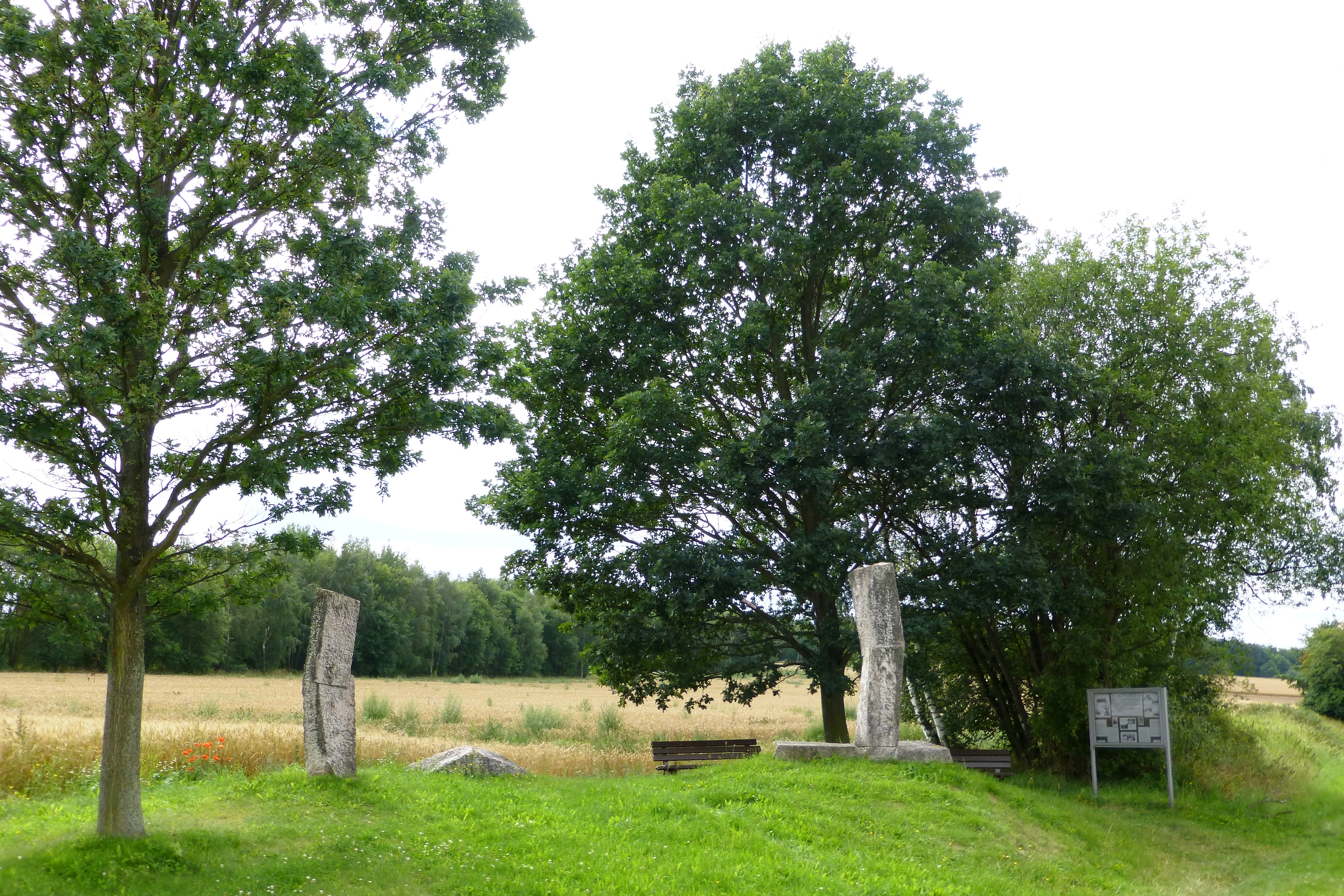 Steinskulptur des Bildhauers Roger Bischoff an der ehemaligen innerdeutschen Grenze zwischen Böseckendorf und Nesselröden, errichtet 1991